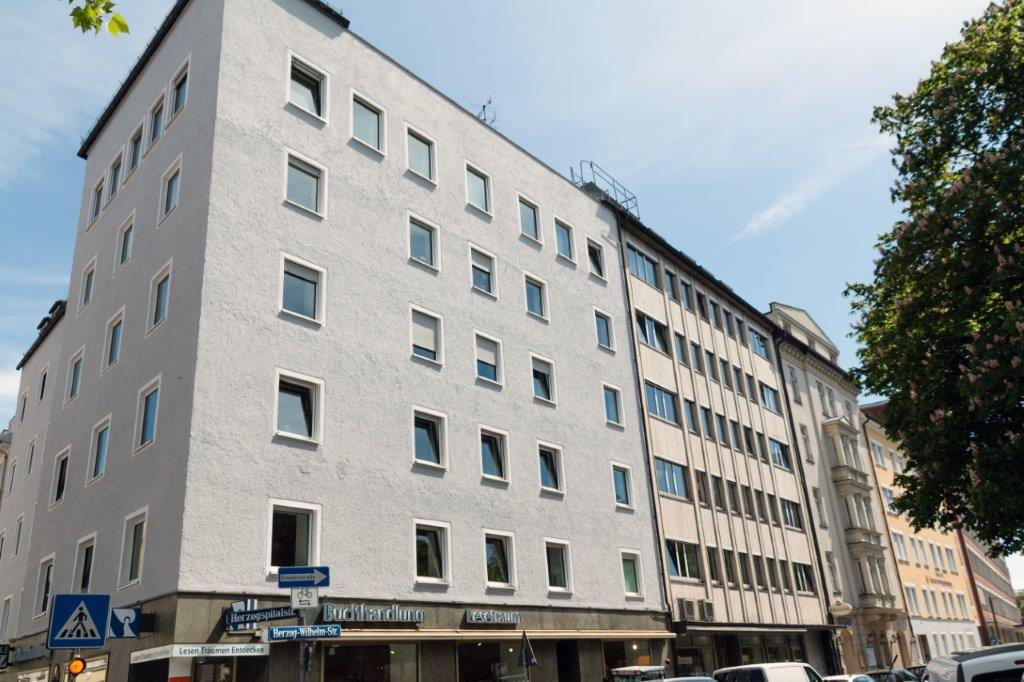 Häuser des Sankt Michaelsbundes in der Herzog-Wilhelm-Str. (rechts) und Herzogspitalstr. (links)